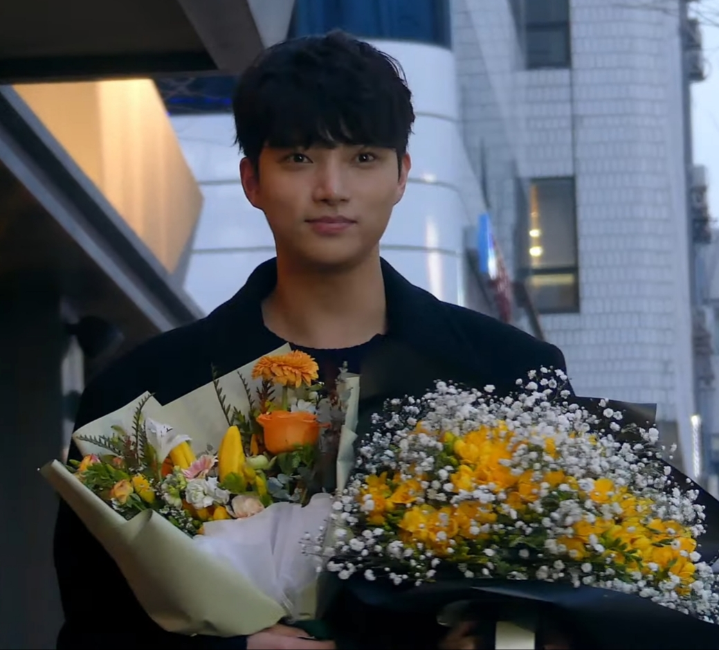 2019년 2월 22일 열린 황후의품격 종방연에 참석한 오승윤